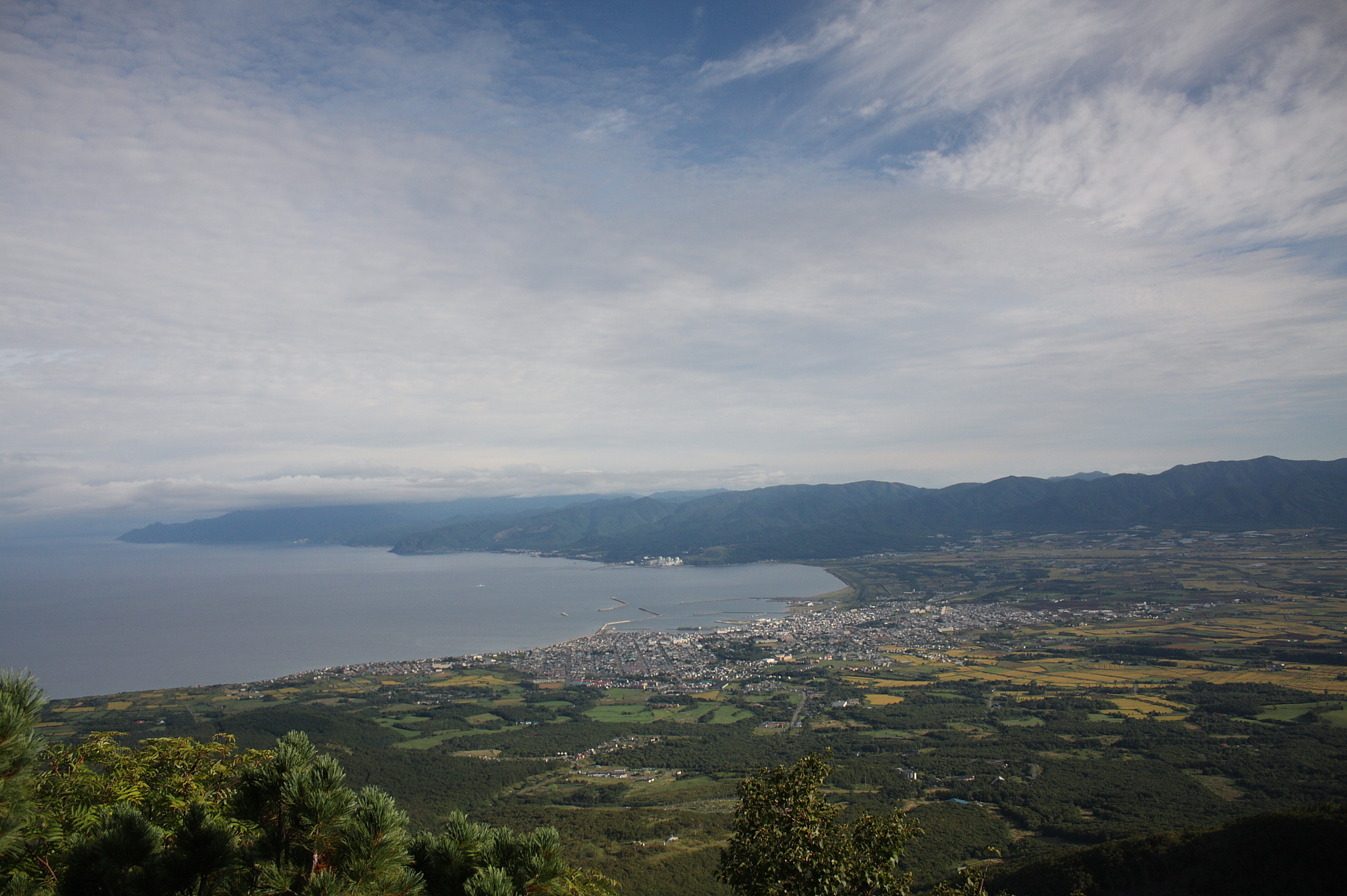 岩内岳から岩内、泊を望む